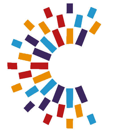 Símbolo del partido político chileno Ciudadanos.